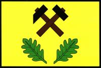 Těně, vlajka. Žlutý list s černými hornickými kladívky s hnědými topůrky nad dvěma odvrácenými vztyčenými zelenými dubovými listy. Poměr šířky k délce listu je 2 : 3.